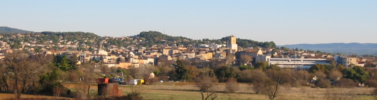 Vue générale de Pertuis